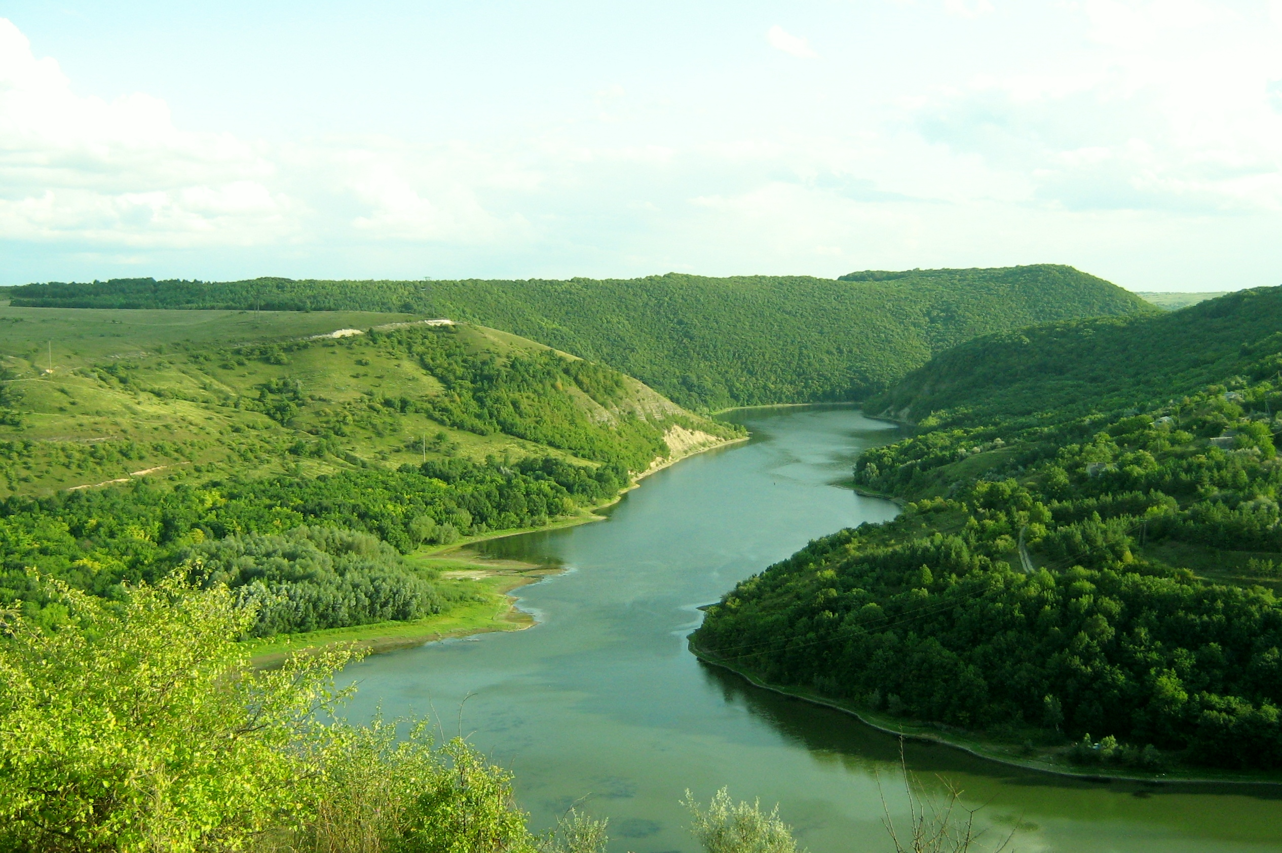 Подільські Товтри, Кам’янець-Подільський, Чемеровецький, Городоцький райони